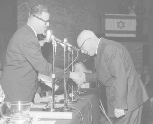 צבי סליטרניק מקבל פרס ישראל 1962 צלם יהודה איזנשטרק גנזך המדינה